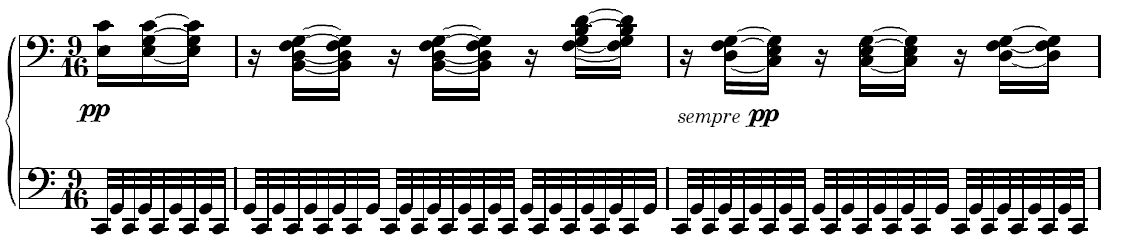 Premières mesures de la quatrième variation de l'Arietta de la Sonate pour piano nº 32, opus 111, de Ludwig van Beethoven